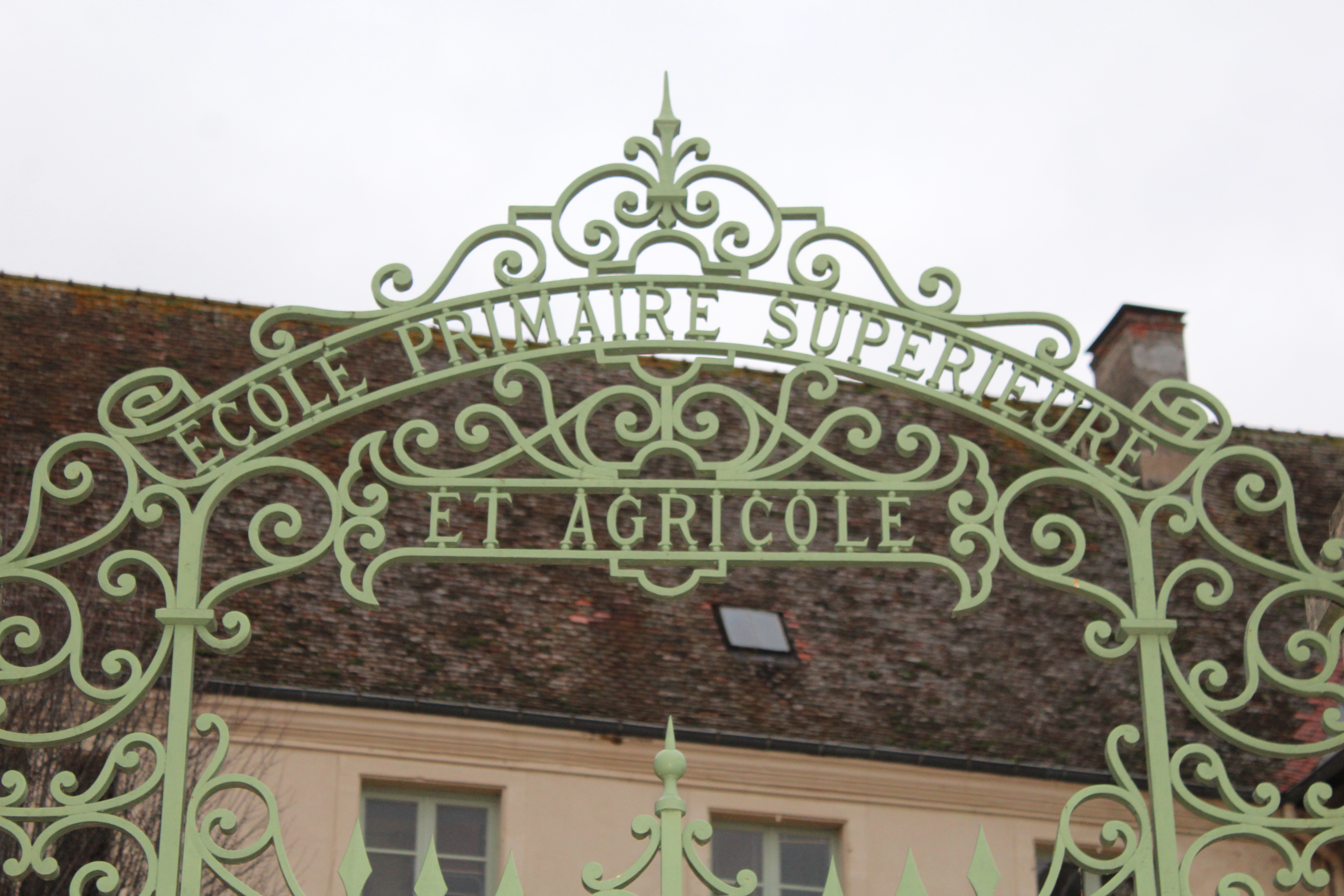 Portail de l'école Primaire Supérieure et Agricole à Marcigny, qui était dans le couvent des Ursulines.